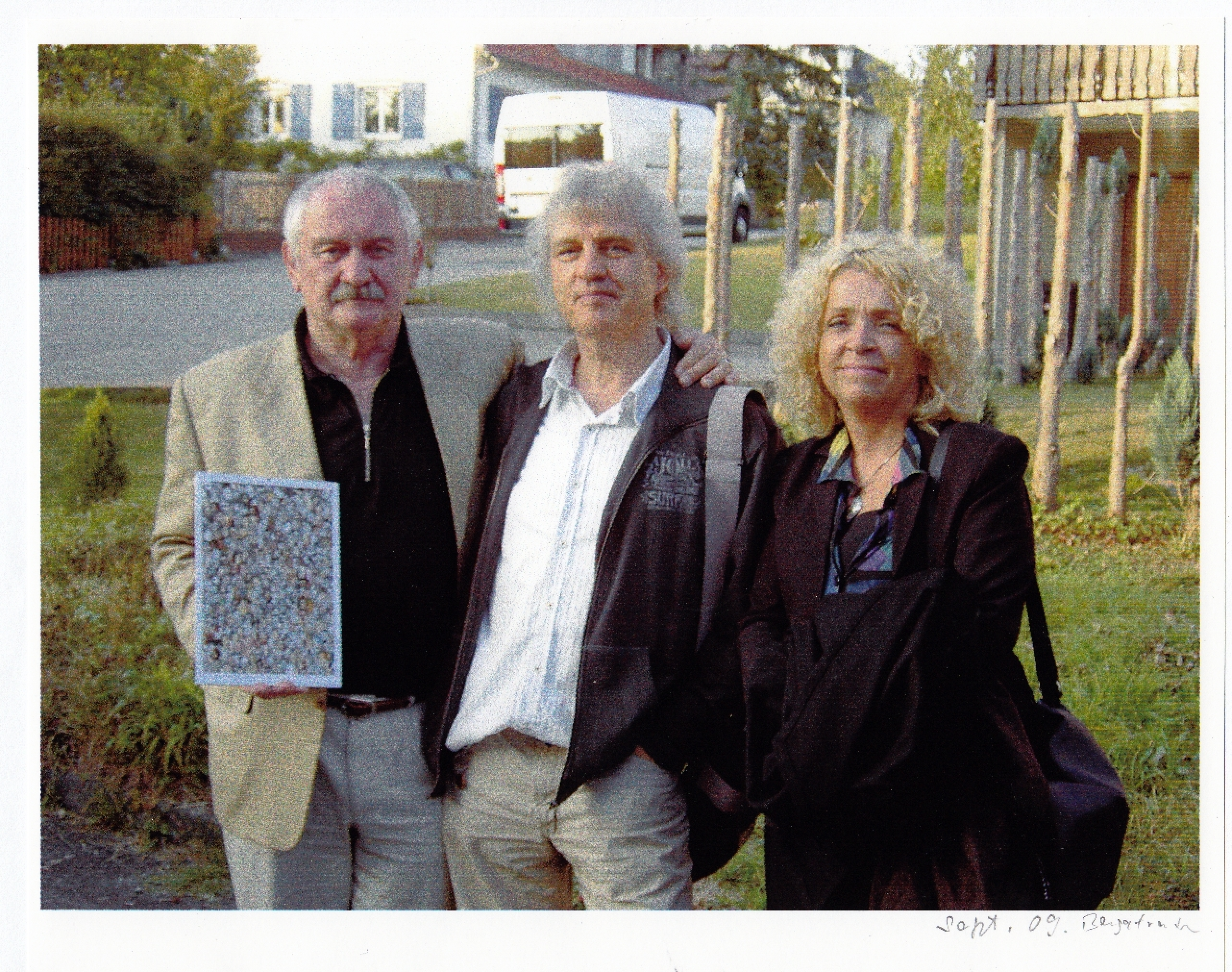 Selbst mit Isabelle Federkeil und Gerd-Peter Eigner in Bergatreute Sept. 2015 Foto Sigrid, Marion Dirks